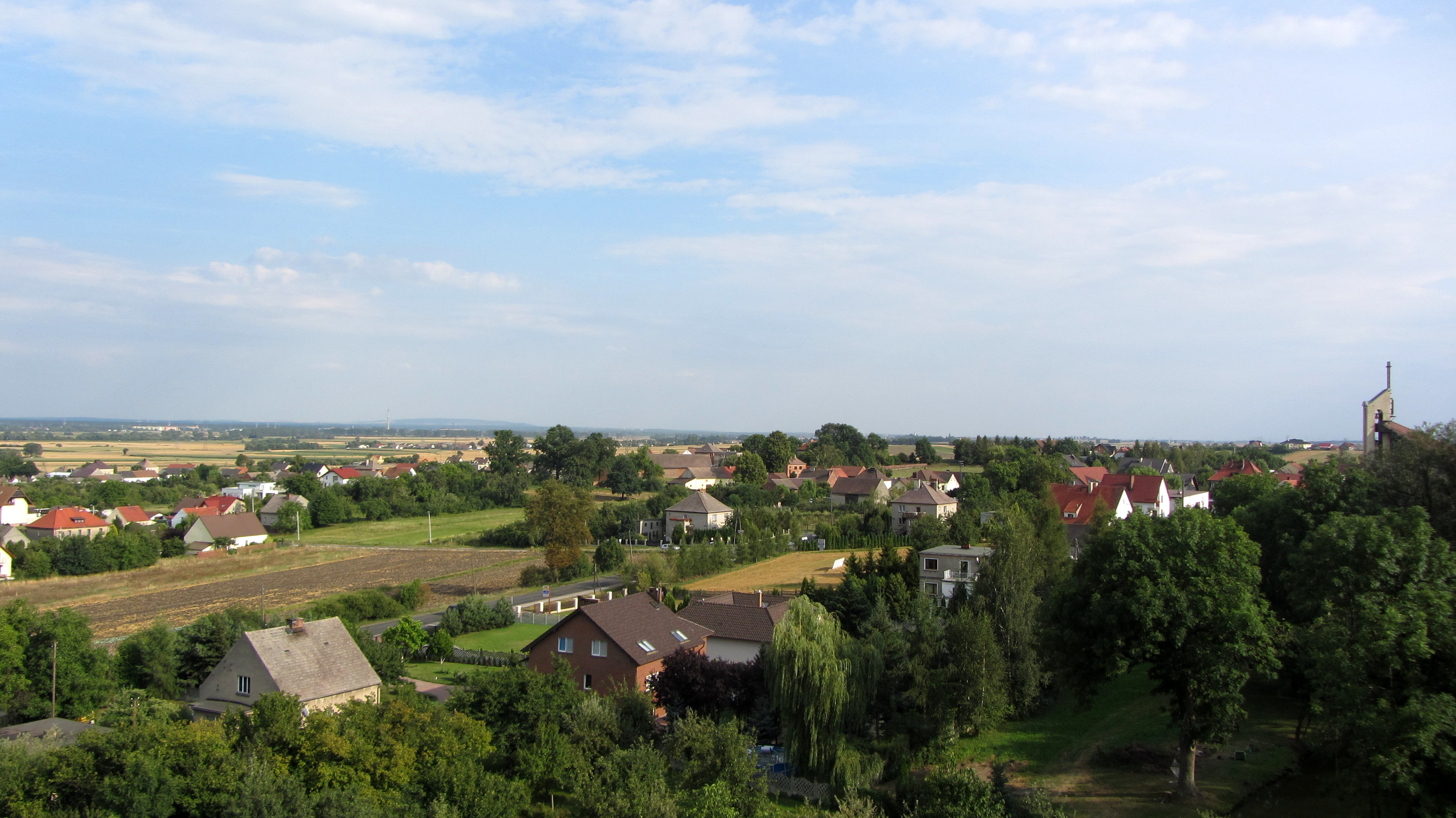 Panorama vom Dorf Winów Winau bei Opole oppeln